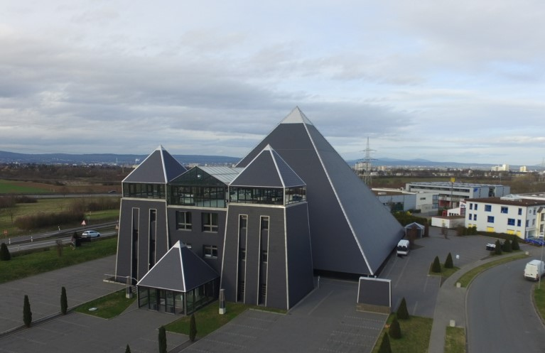 Pyramide Mainz Nikolaus-Kopernikus-Straße 17, 55129 Mainz 49.965887N, 8.255944E